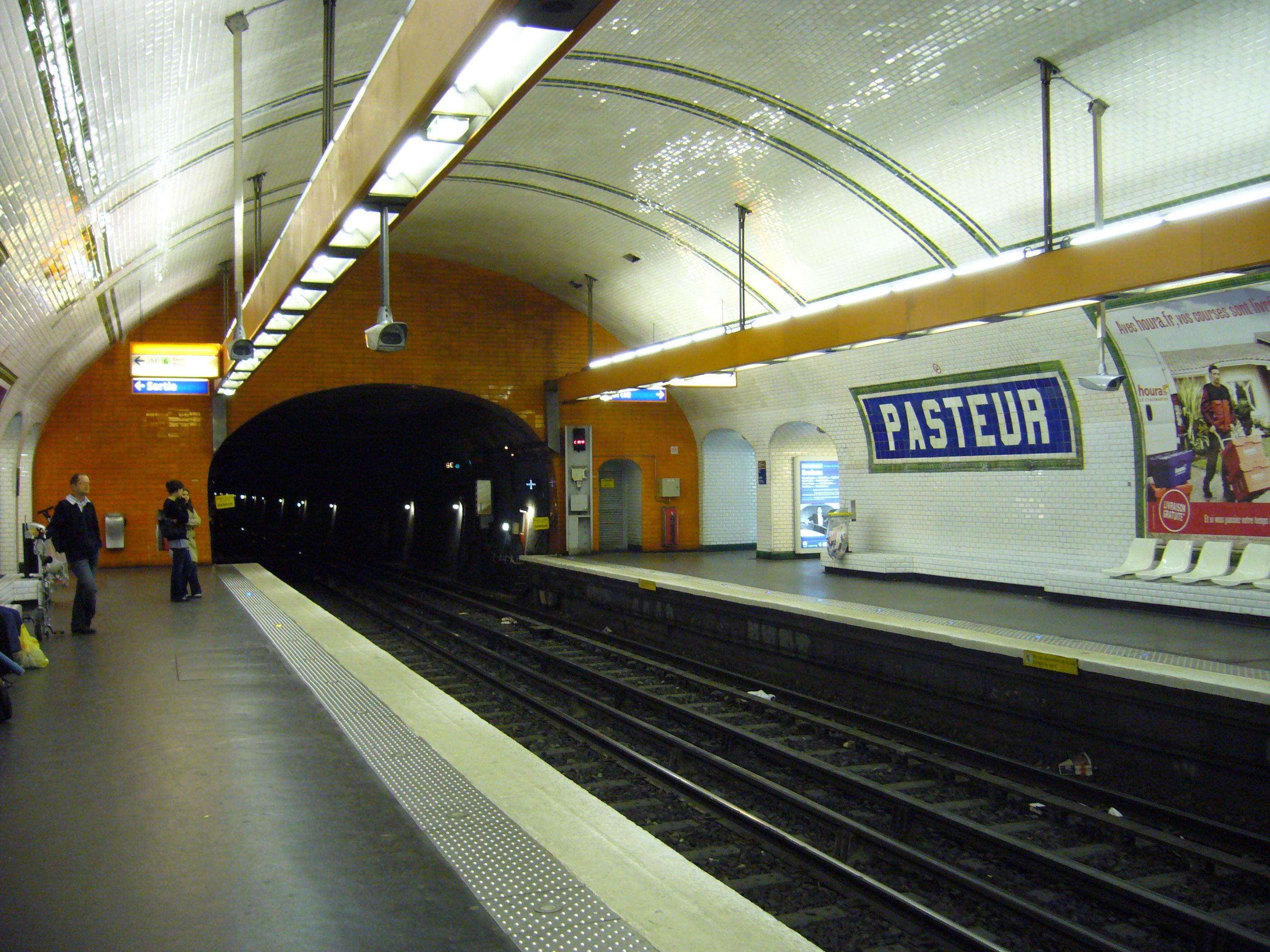 Vue du quai de la station Pasteur sur la ligne 12 du métro de Paris.